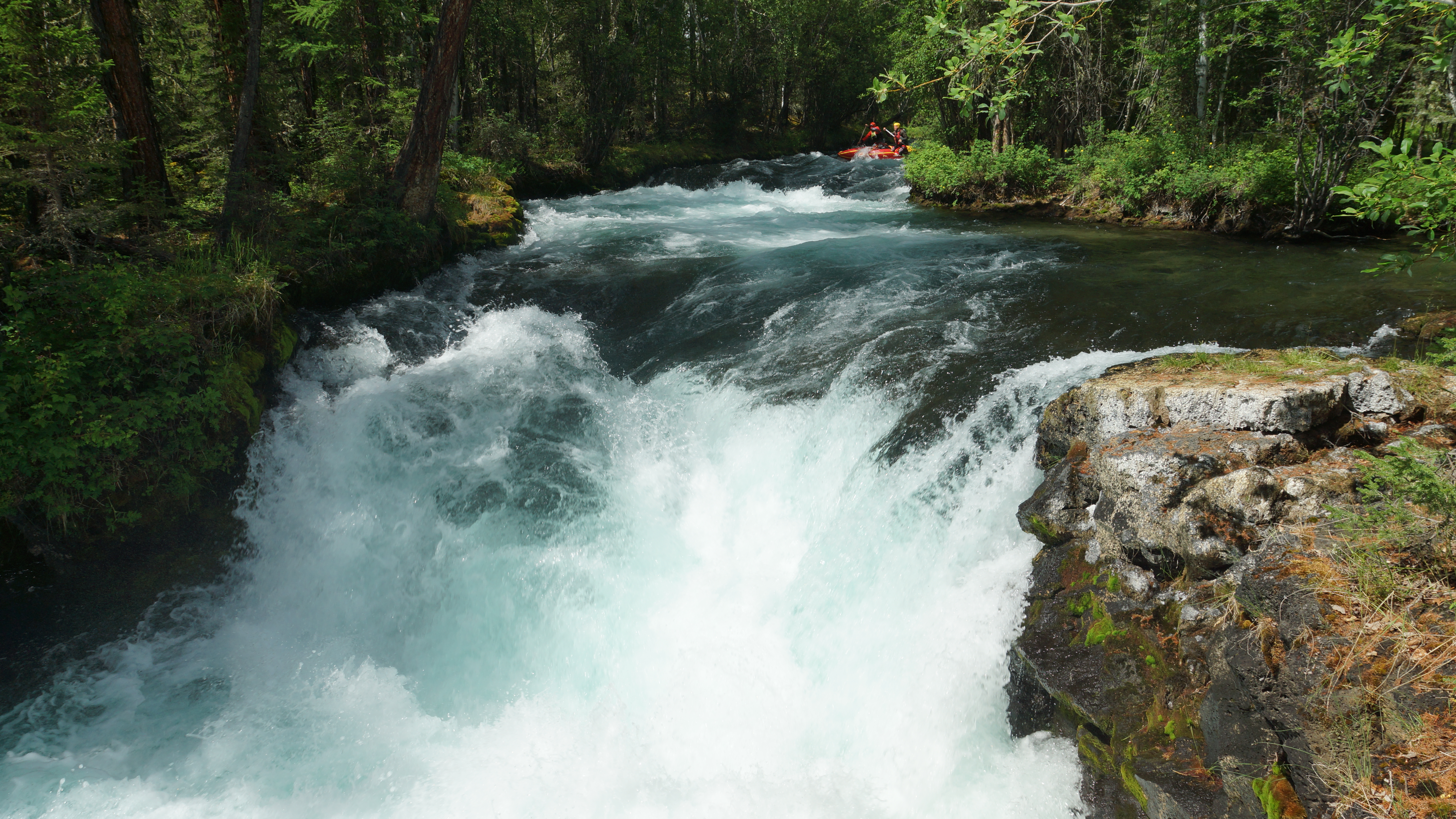 Порог "Катапульта "5 категории на реке Жомболок.